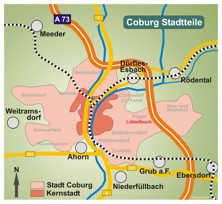 Karte von Coburg, Stadtteil Lützelbuch